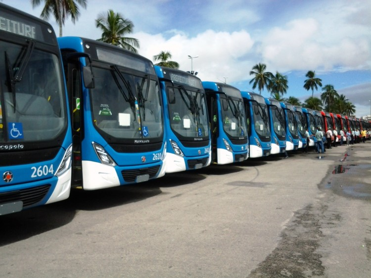 Frota de Ônibus de Macei[o